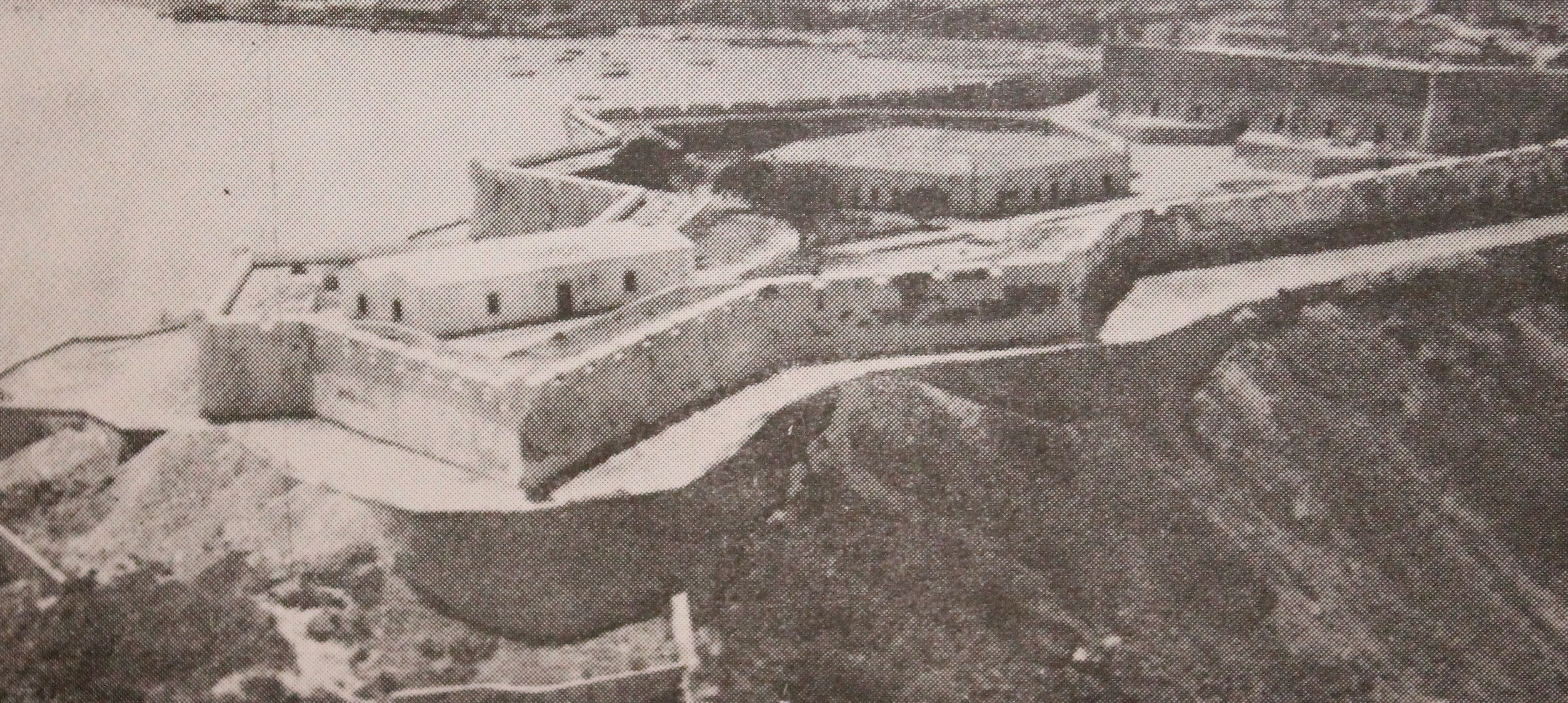 Aspecto Aéreo da Fortaleza de S. Miguel